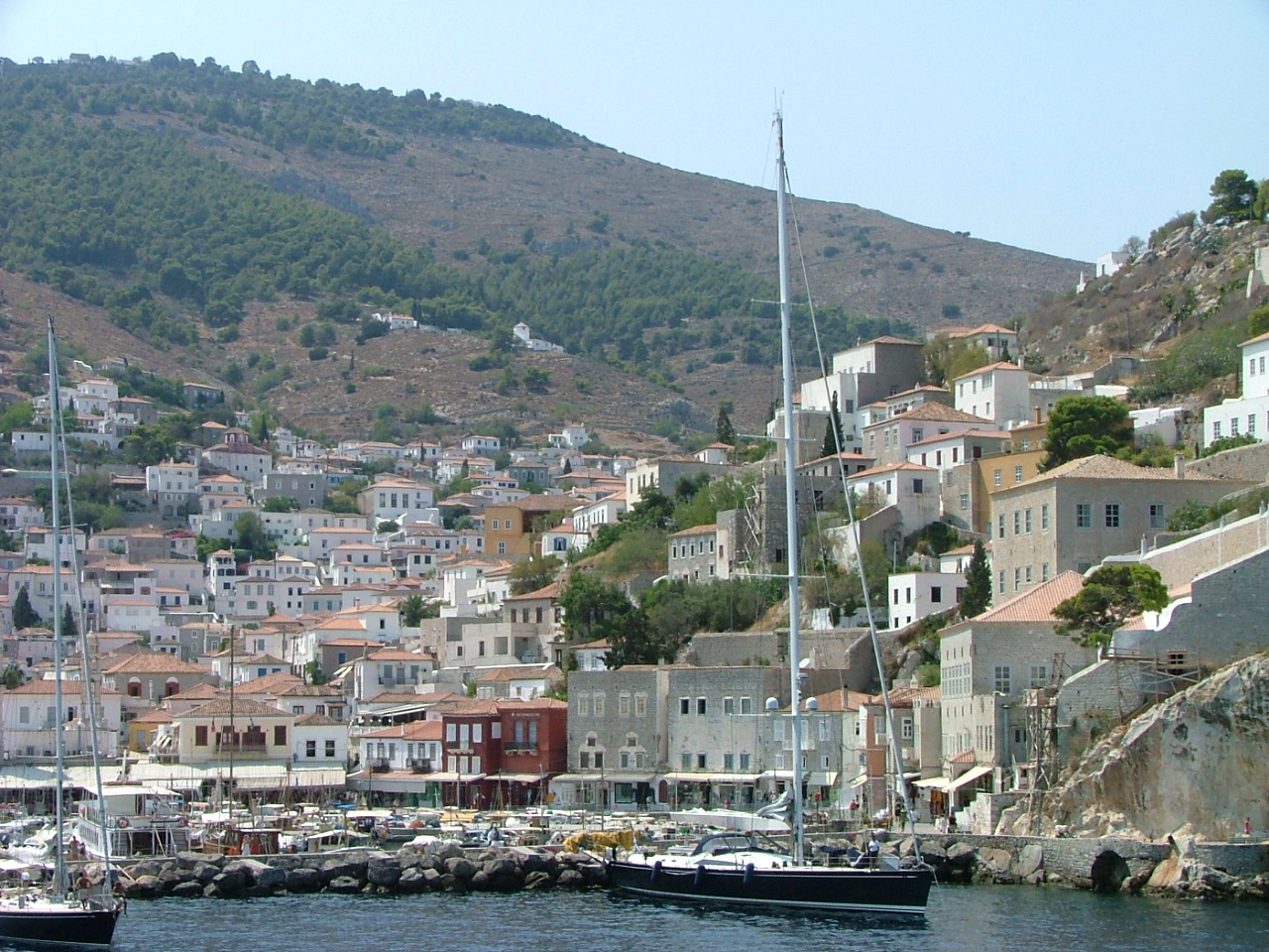 Puerto de la isla de Hidra, enclavada en el golfo Sarónico (mar Egeo), perteneciente a Grecia.